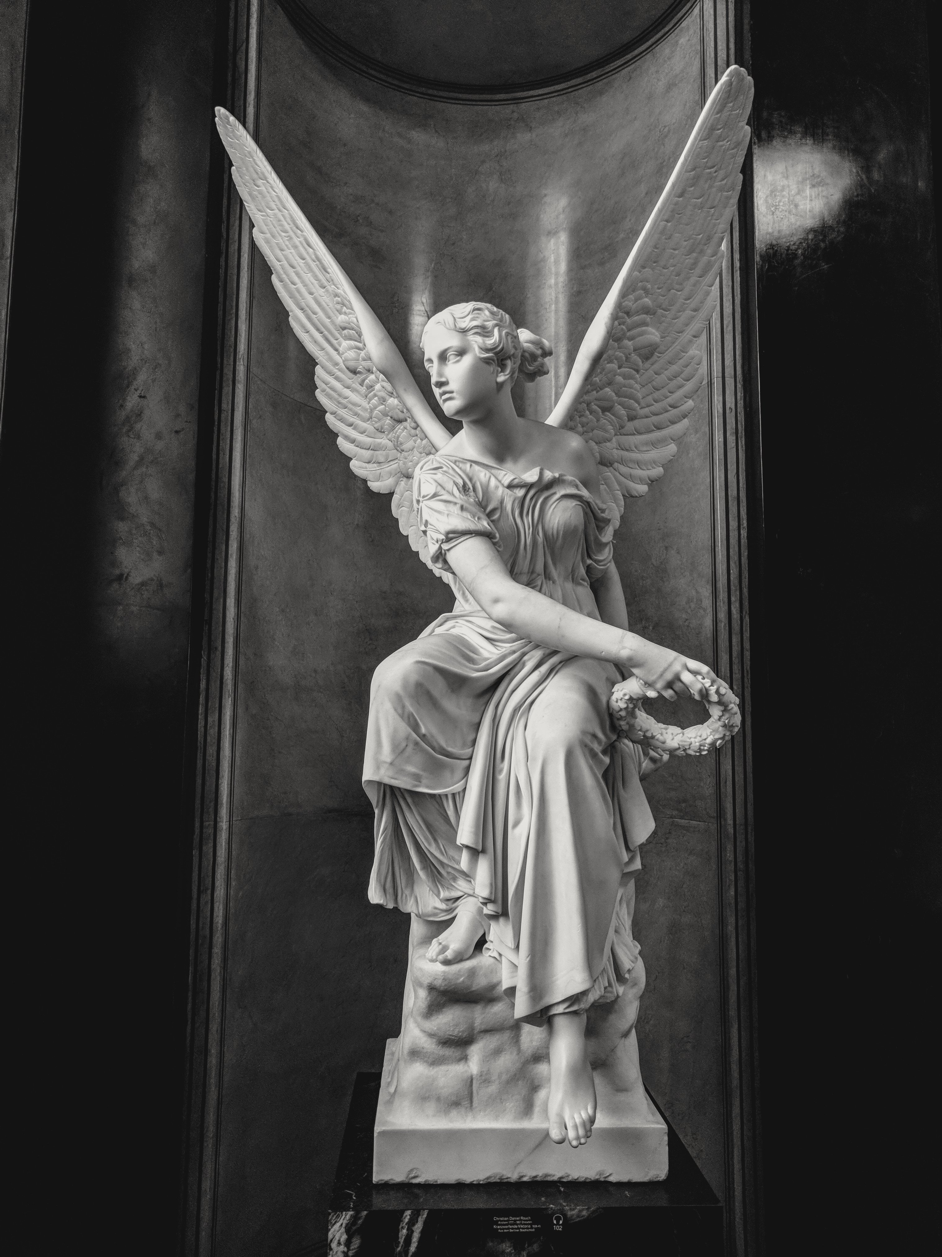 Victoria, por Christian Daniel Rauch